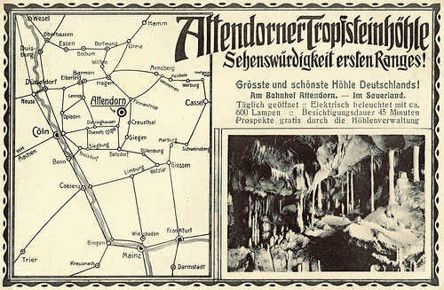 Postkarte der Attahöhle